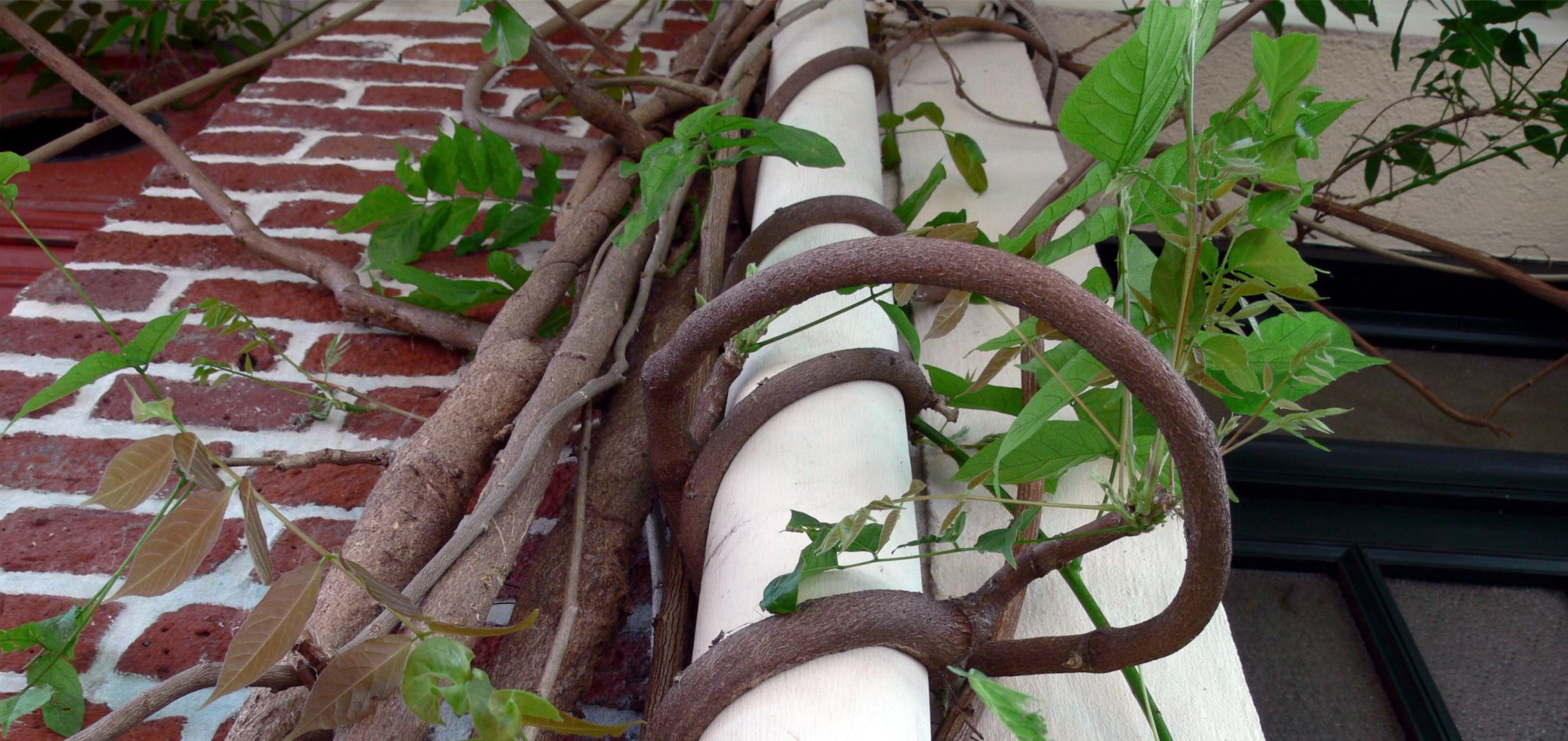 Glycine enroulée autour d'une gouttière ; Lieu : Lille, Nord (59), France Catégorie:Environnement Catégorie:écologie Catégorie:développement durable